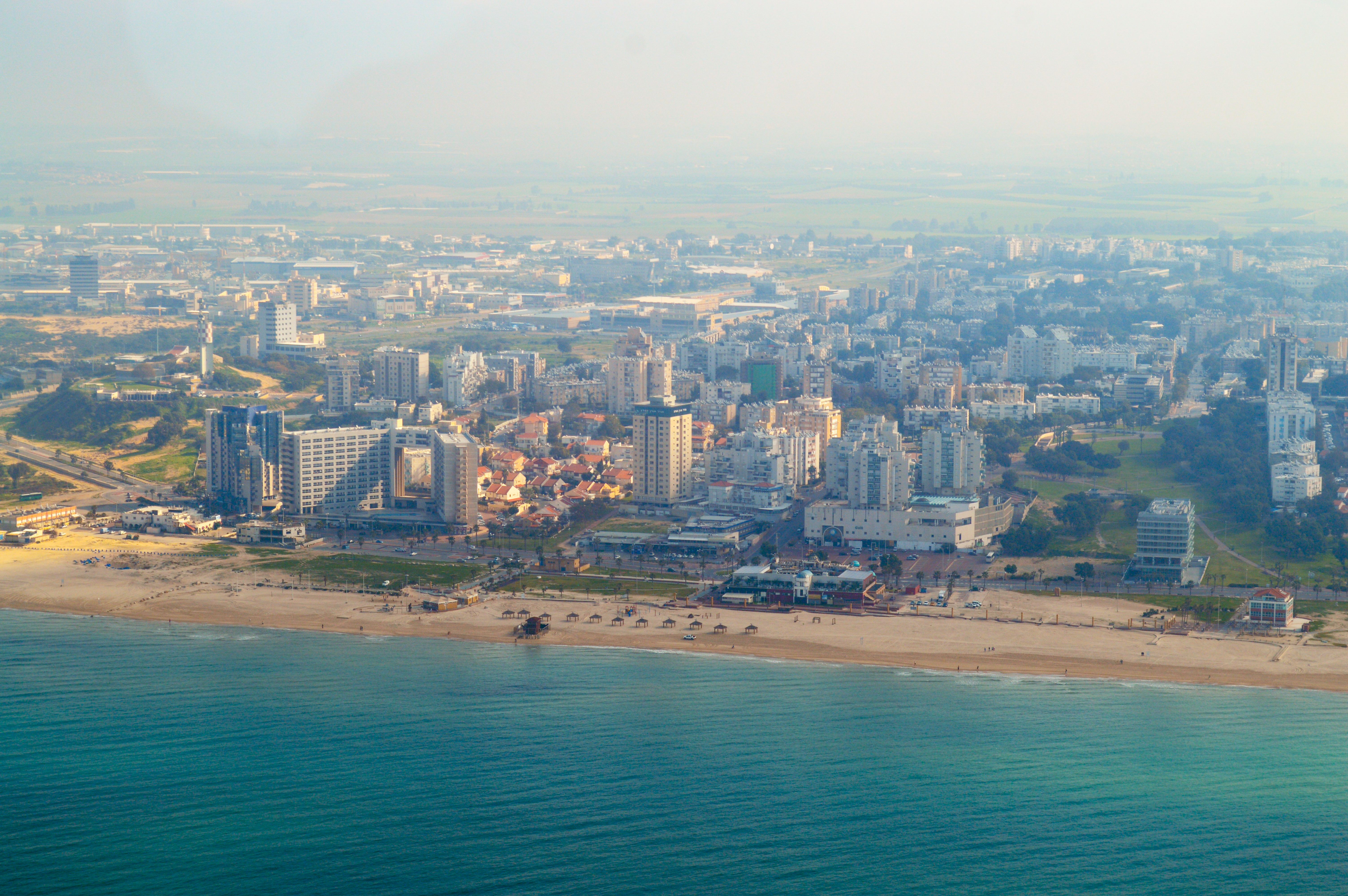 צילום אוויר - אשדוד (משופר)